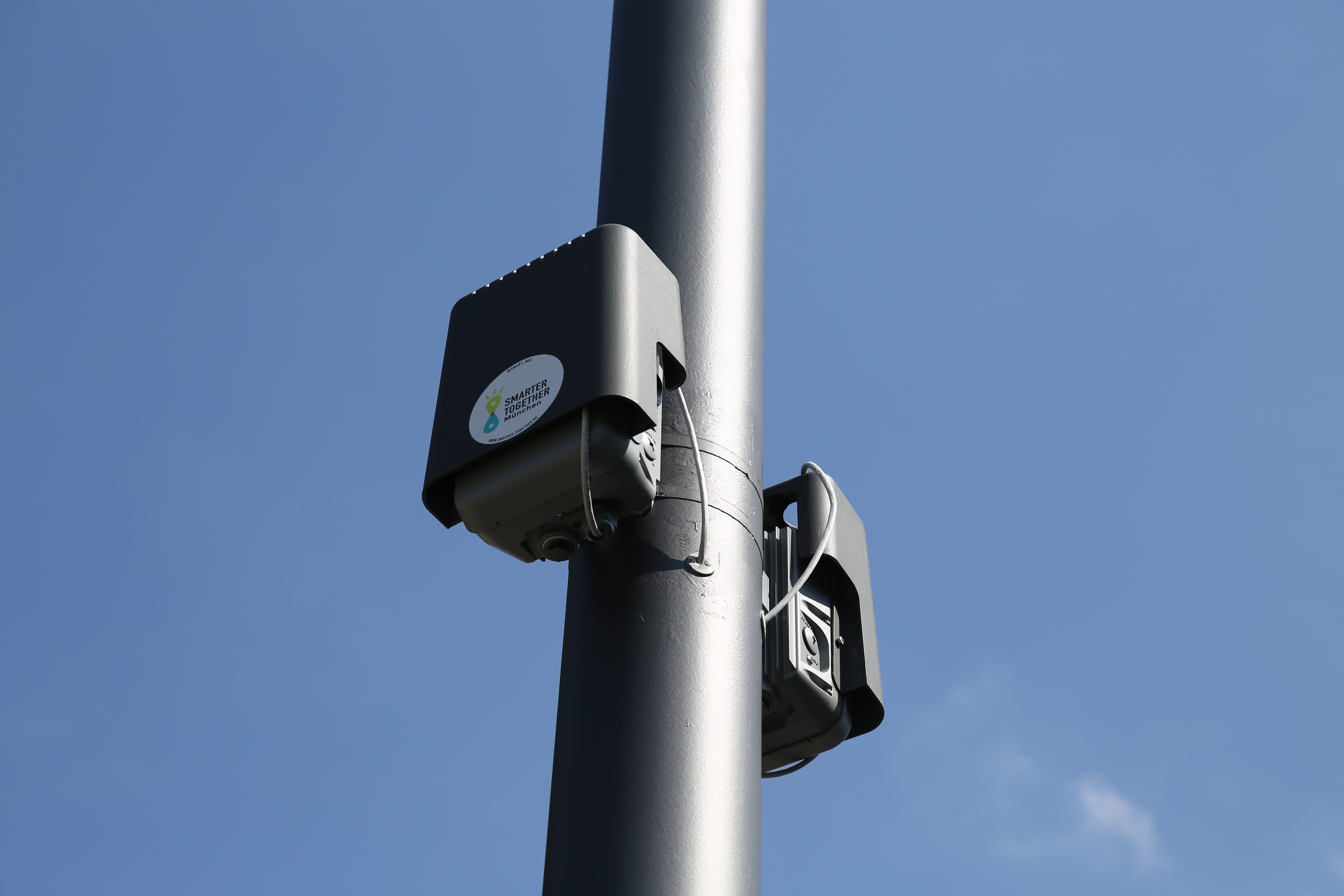 Eröffnung des Projekts Smarter Together im Müchner Modellstadtteil Neuaubing-Westkreuz am 2018-07-27, München, Wien und Lyon sind die Projektstädte eines EU-Projektes, in dem realisierbare Techniken der Smart City umgesetzt und im Massenmarkt getestet werden. Zu den Projekttechnologien gehört Mobilität mit Carsharing von Elektroautos, Mietfahrrädern, Miet-Pedelecs und E-Lastenrädern, Abhol- und Bringsysteme mit Quartierboxen. Förderung von Energie-Projekten im Bestandsbau und Sensorik im öffentlichen Raum.